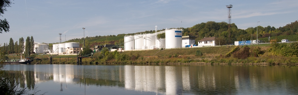 Tanklux zu Mäertert Kategorie:Gemeng Mäertert